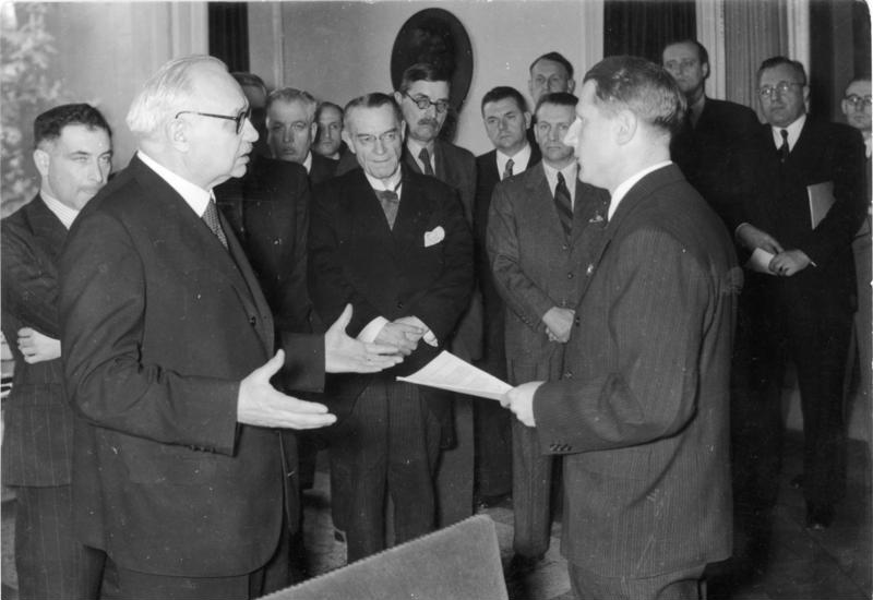 This description has been identified as biased or incorrect: Die Bildbeschreibung stellt den Massenmord der Sowjets im Katyner Wald an kriegsgefangenen Polen als faschistische Propaganda dar, tatsächlich sei das Kriegsverbrechen "von den Faschisten selbst" ausgeübt worden. Die Bildbeschreibung ist ein Beispiel für ostdeutsche und sowjetische Geschichtsschreibung. Auch in den Schulen wurde der Massenmord von Katyn bis zum Ende der DDR und der Sowjetunion als nationalsozialistisches deutsches Verbrechen umgedeutet.Zentralbild II. Weltkrieg 1939 - 45 Im April 1943 starten die deutschen Faschisten die antisowjetische Propaganda über den Massenmord im Katyner Wald, 15 klm nw. von Smolensk, wo sie Massengräber mit ca. 11 000 ermordeten kriegsgefangenen Polen als Greueltaten der Sowjets erklärten. ( Die Außerordentliche Staatliche Kommission unter Leitung des Akademikers Burdenko stellte in ihrem Untersuchungsbericht vom 24.01.1944 fest, dass die Ermordungen nicht wie die Faschisten behauptet hatten, im Frühjahr 1940 sondern erst im Herbst 1941, also von den Faschisten selbst, stattgefunden haben.) UBz: die Mediziner aus ganz Europa, die auf Einladung des Reichsgesundheitsführers Dr. Conti die Massengräber im Wald von Katyn besichtigt haben, überreichen durch Prof. Dr. Orsós, Budapest, bei dem Empfang in Berlin, Dr. Conti [Leonardo] (rechts) das Protokoll ihrer Feststellungen. In der Mitte Speleers, Professor der Universität Gent[1] 4. Mai 1943